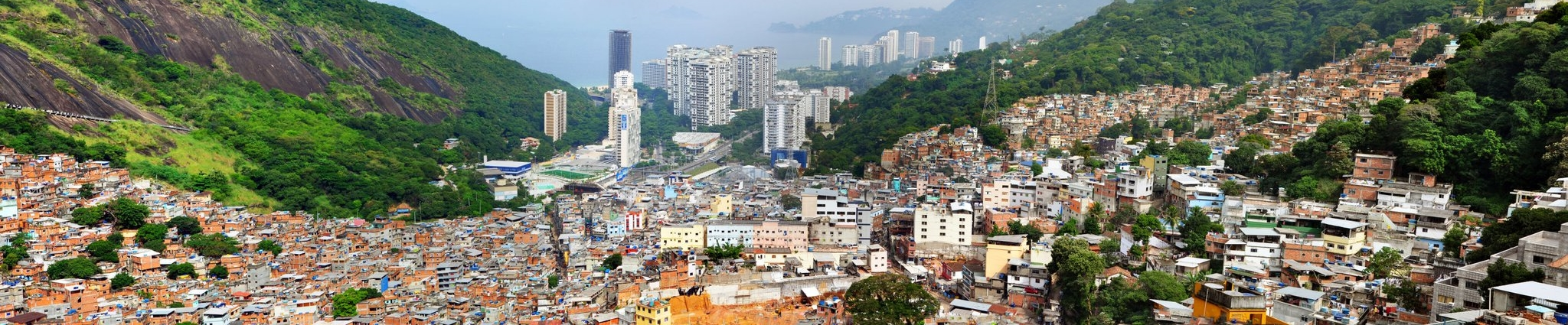 rocinha favela rio de janeiro brazil panorama 2010